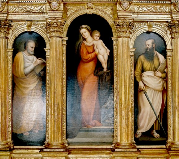 Vaghestelledellorsa